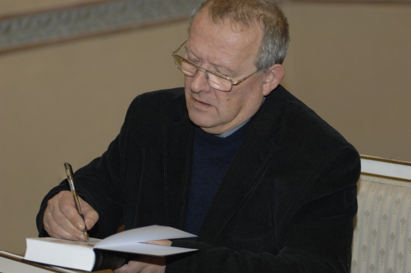 Adam Michnik